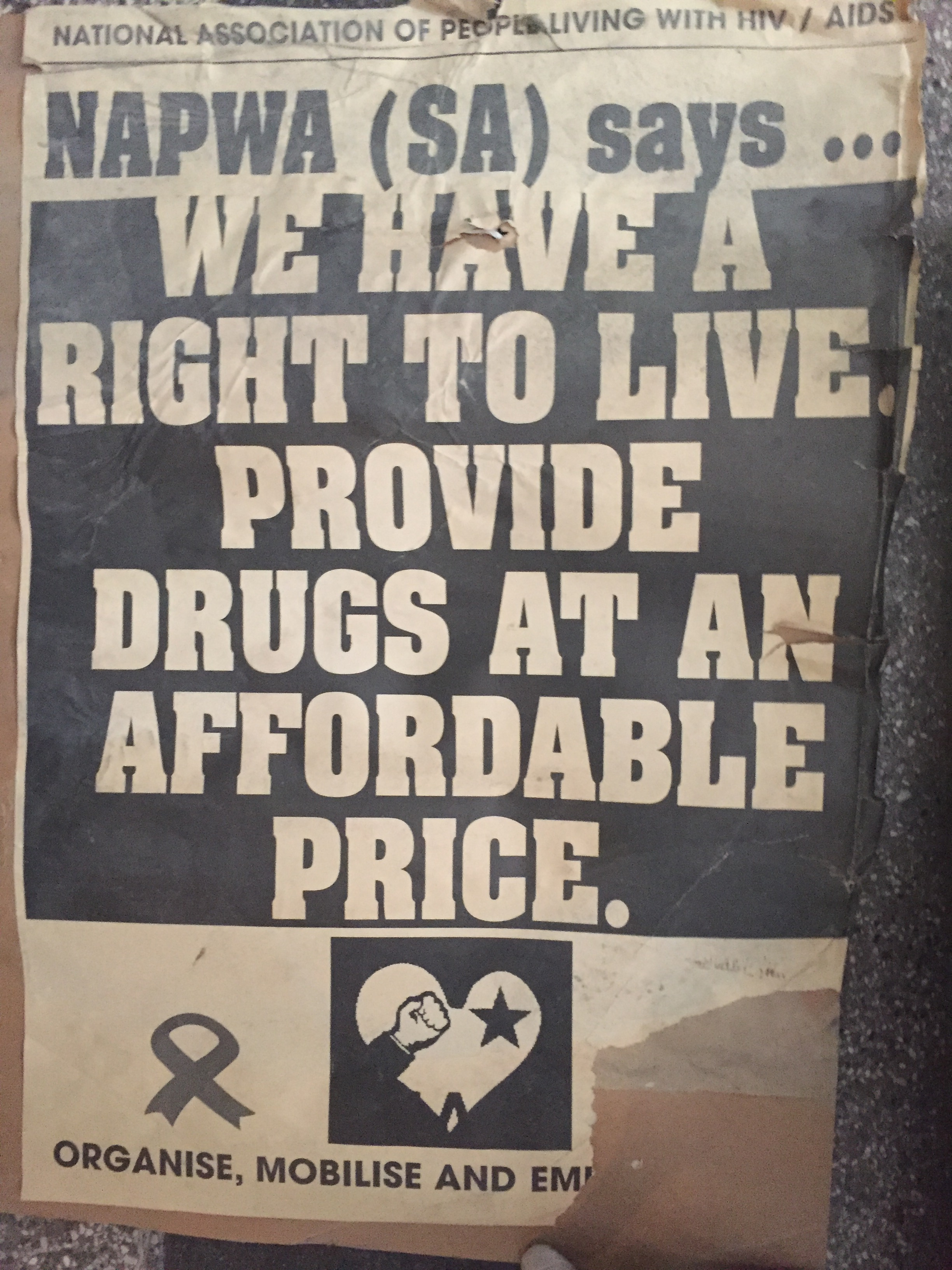 Aids Conference Durban